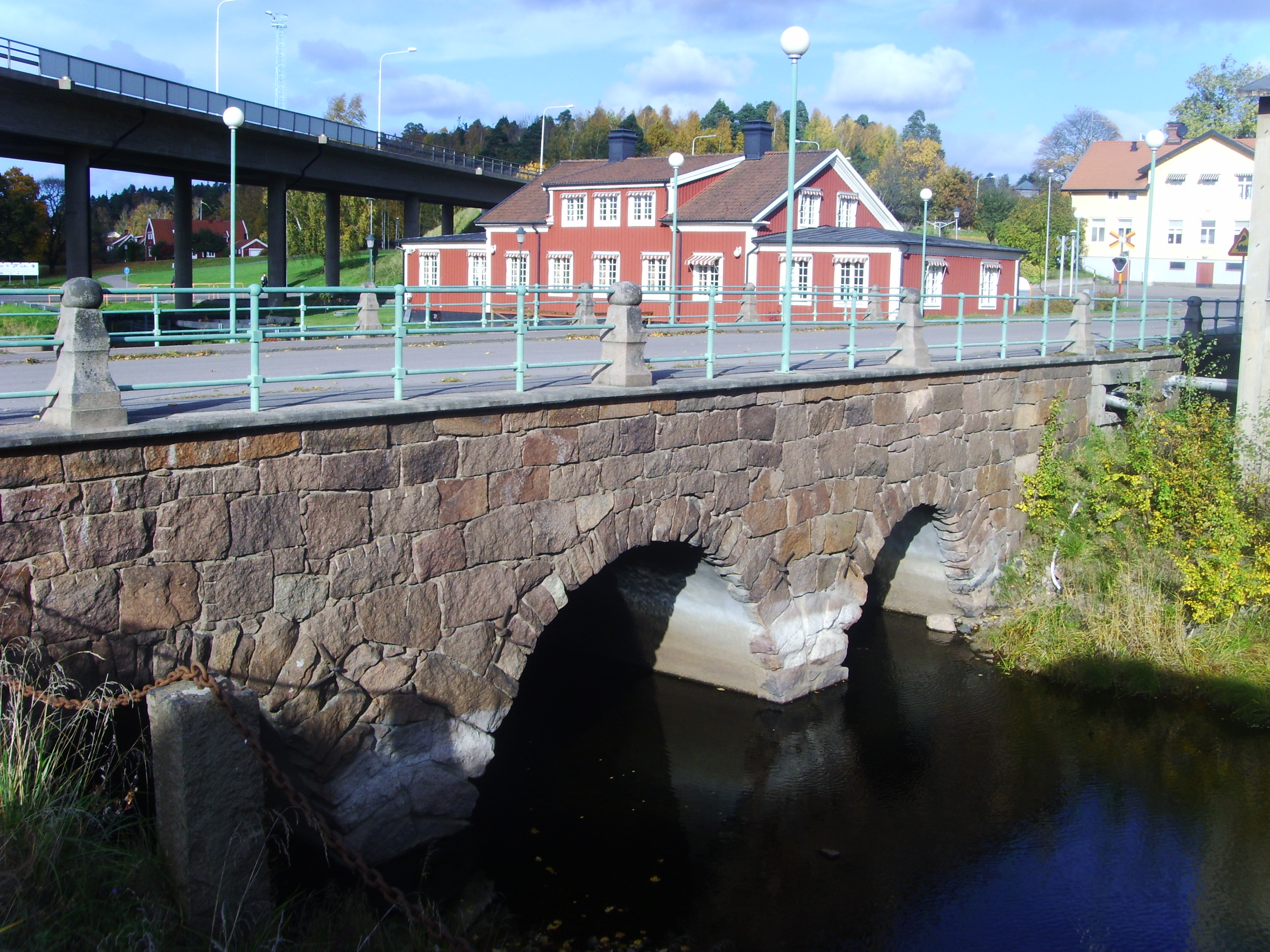 Bruksområdet i Boxholm.